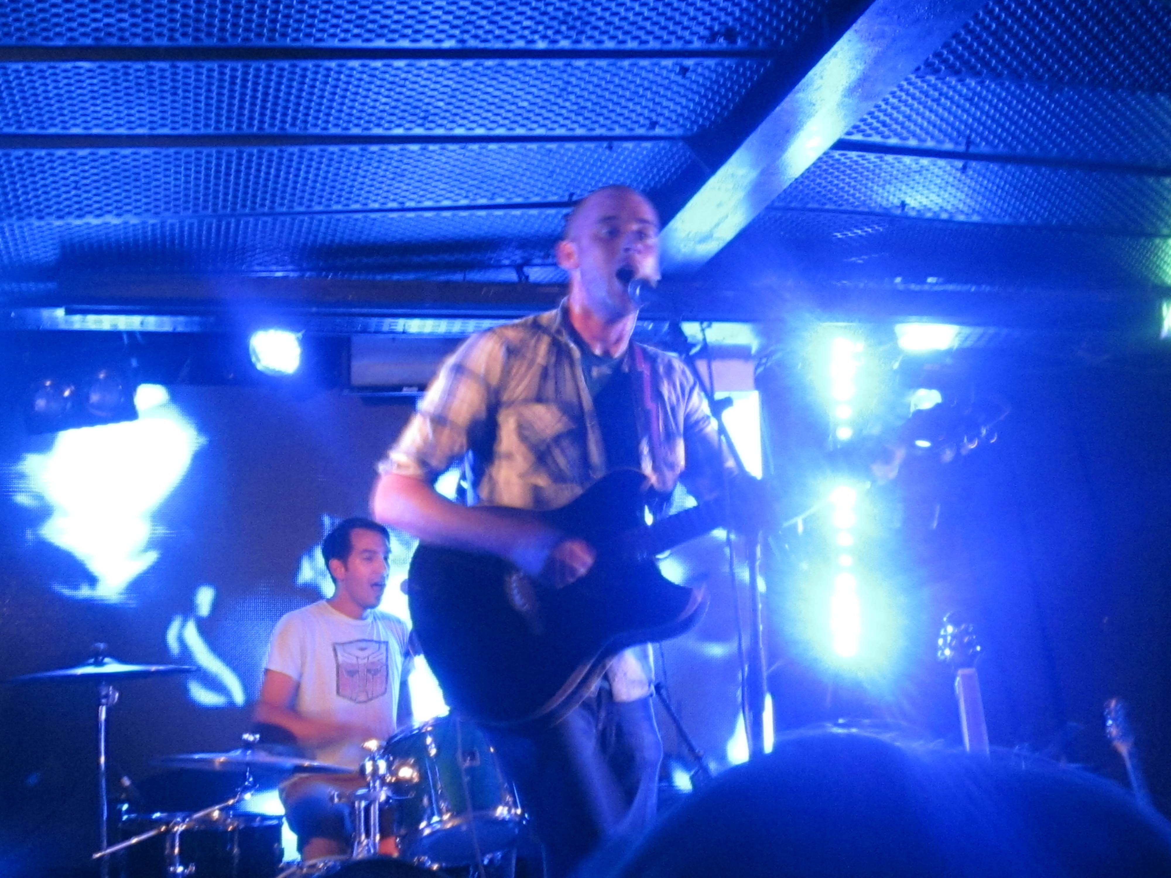 Nice Peter en concert au Batofar, à Paris (14 juillet 2014). Dante Cimadamore l'accompagne à la batterie.